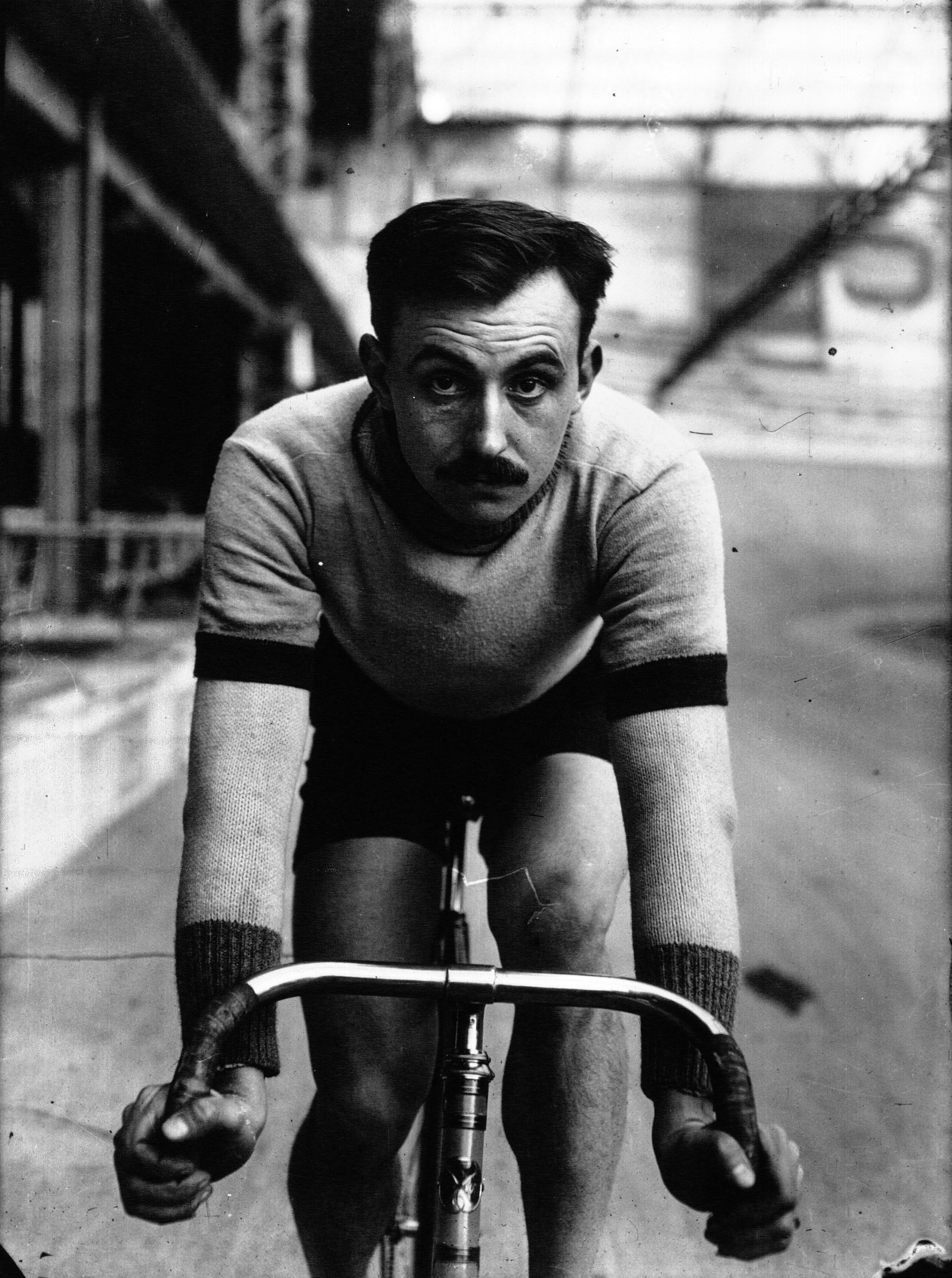 Petit Breton, coureur cycliste.